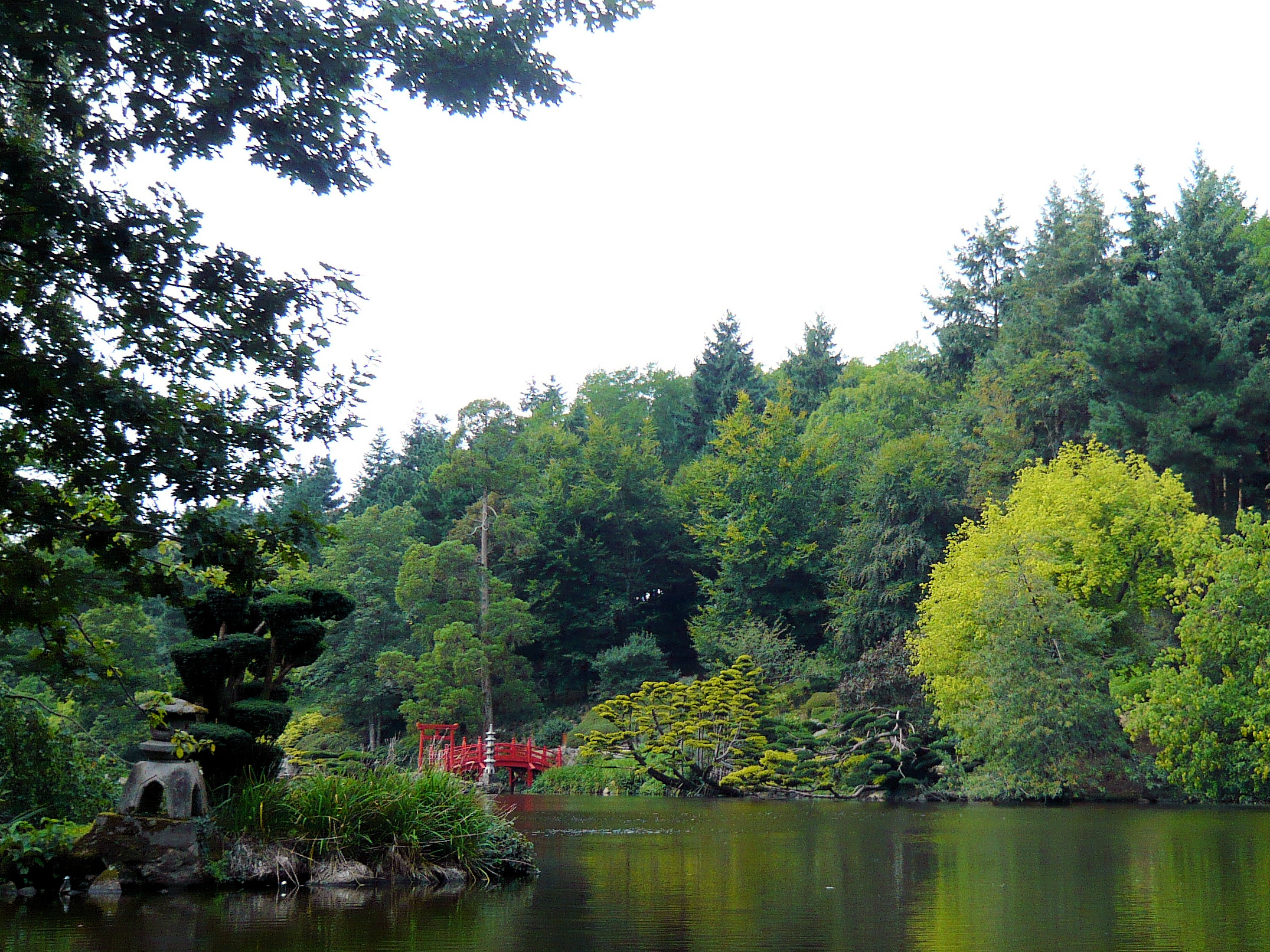 Parc Oriental de Maulévrier, Maine-et-Loire, France